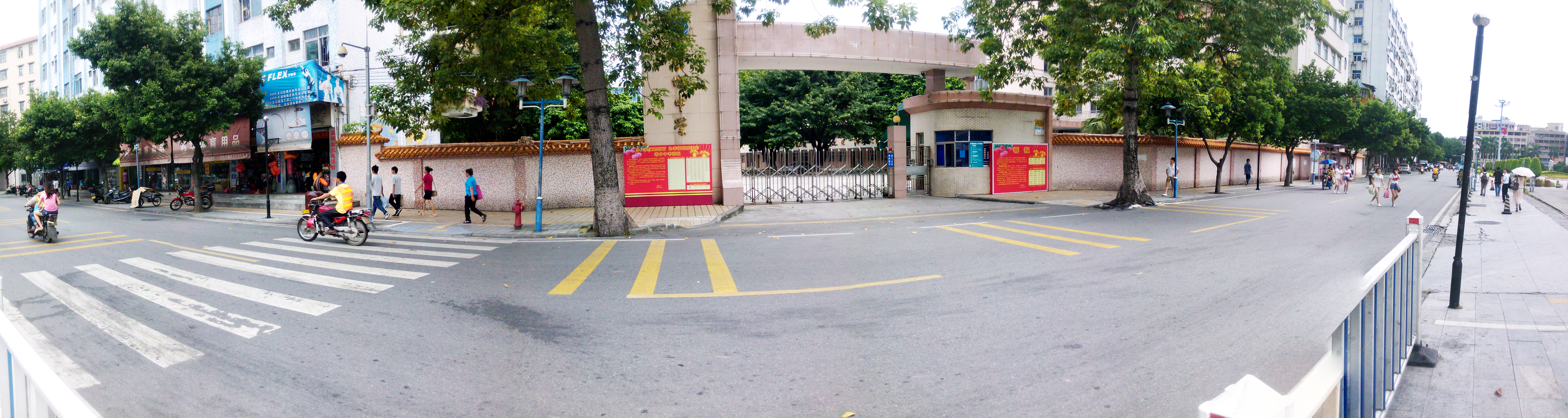 中文（中国大陆）: 增城中学初中部 采用全景摄影